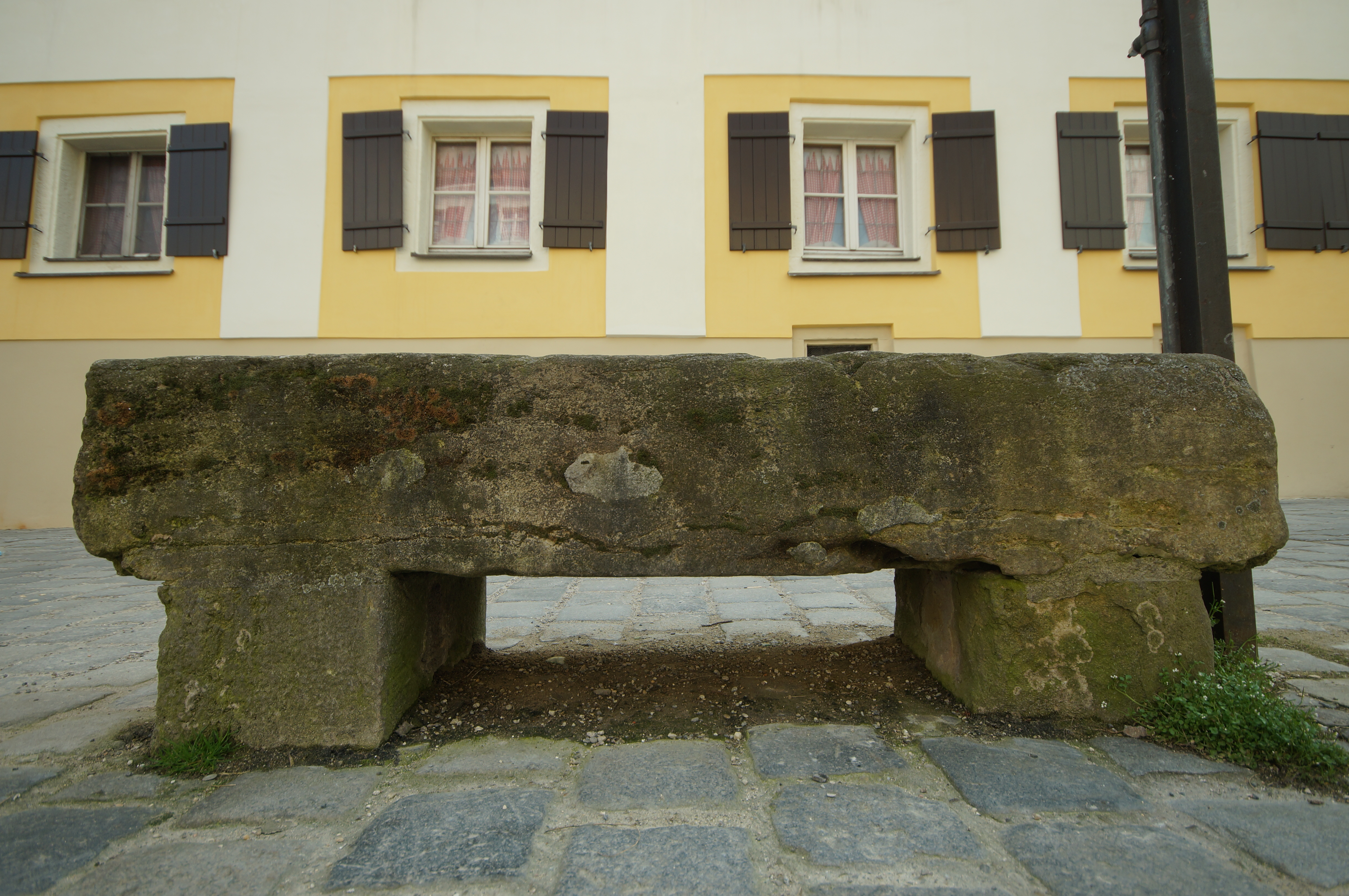 Verkaufsbänke, vier steinerne Blöcke des alten Fischmarkts, wohl 17. Jahrhundert, beim Brunnen.